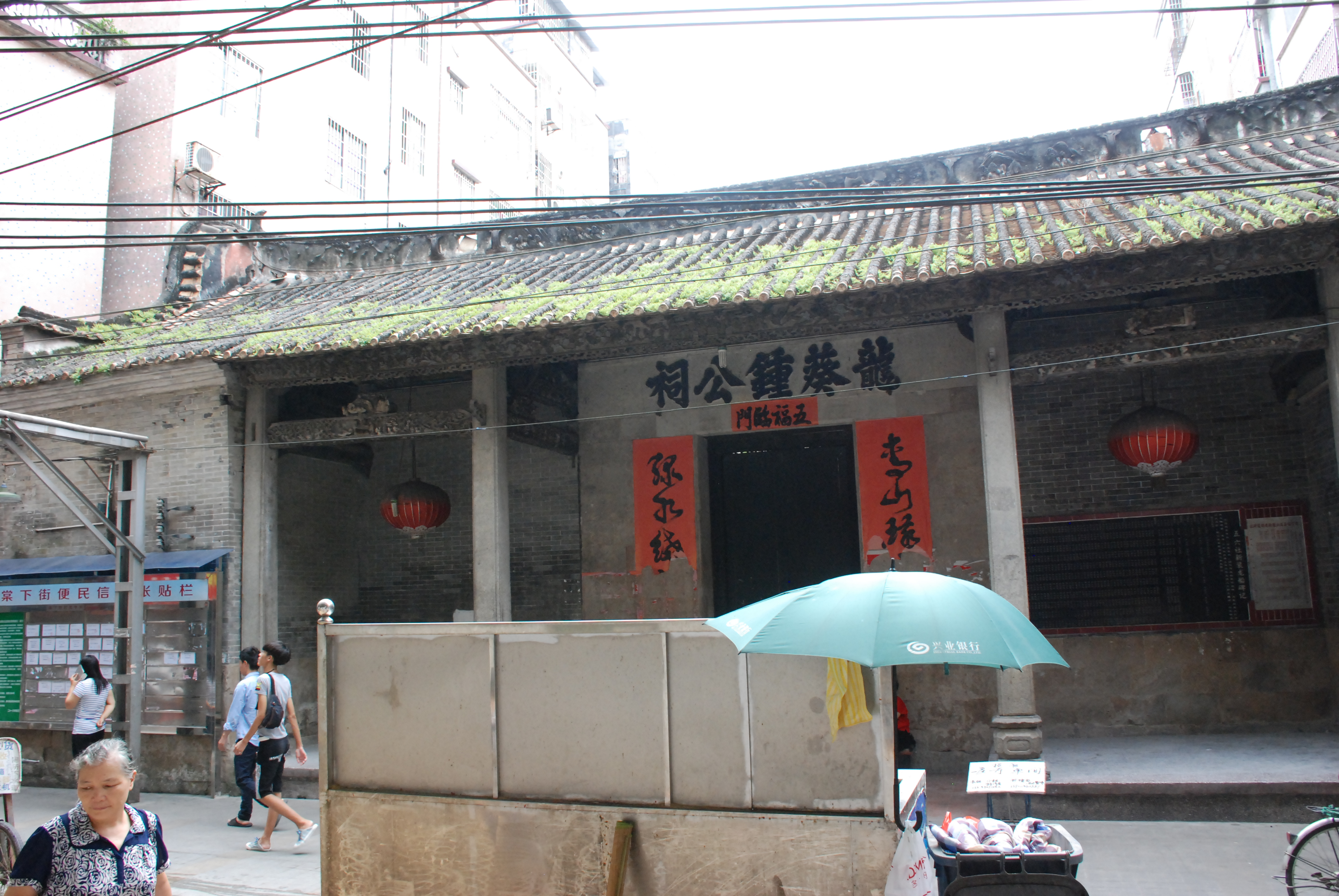 位于广州市天河区棠下街棠下村达善大街49号。是广州市文物保护单位毛泽东视察棠下农业生产合作社旧址的一部分。